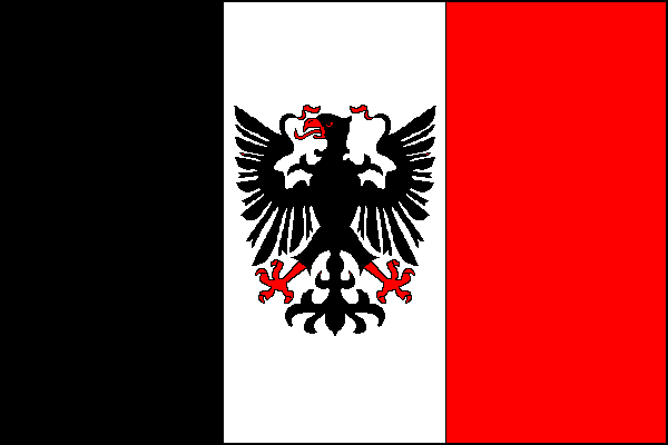 Vlajka města Chrudim